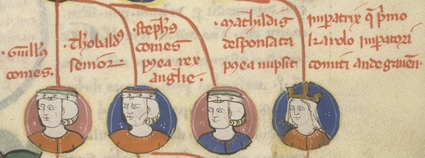 Toulouse, Bibliothèque municipale MS 450: Bernard Gui, De origine prima Francorum f 190r